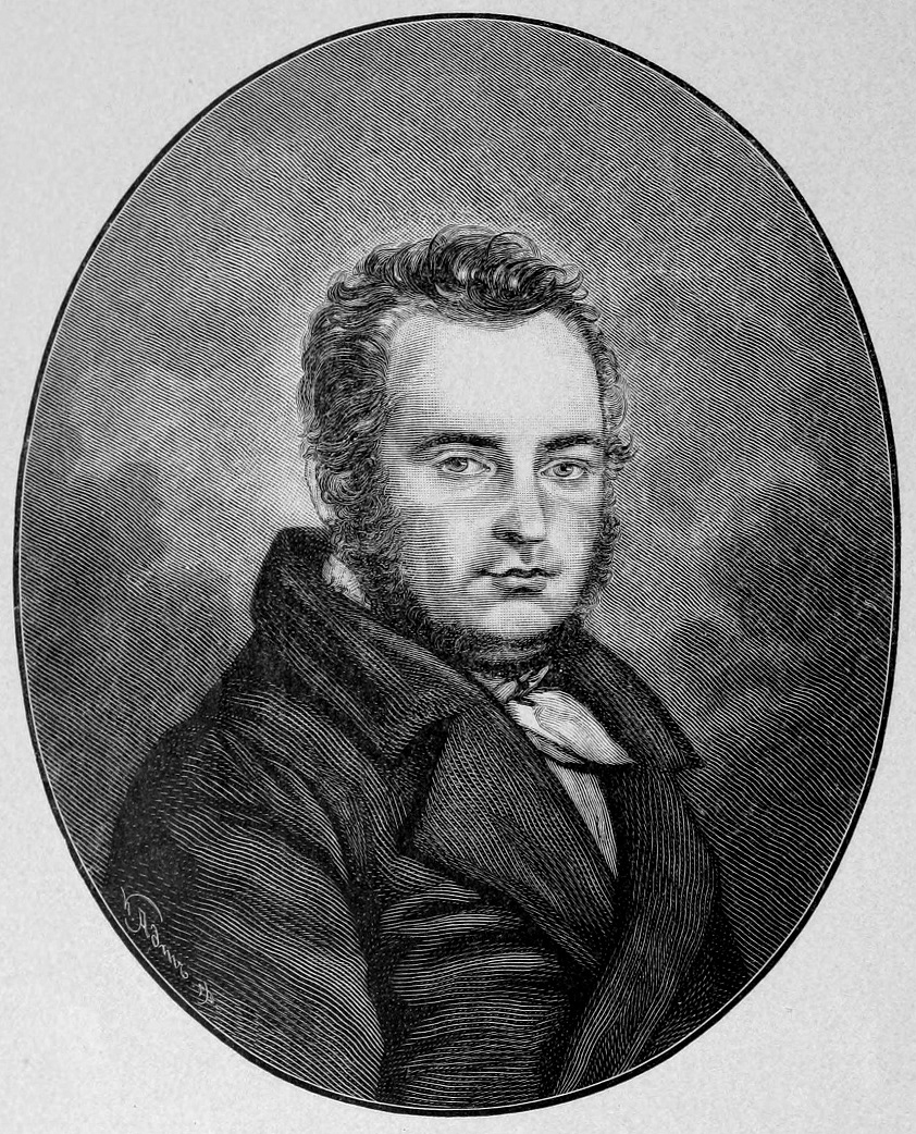 Глинка, Сергей Николаевич